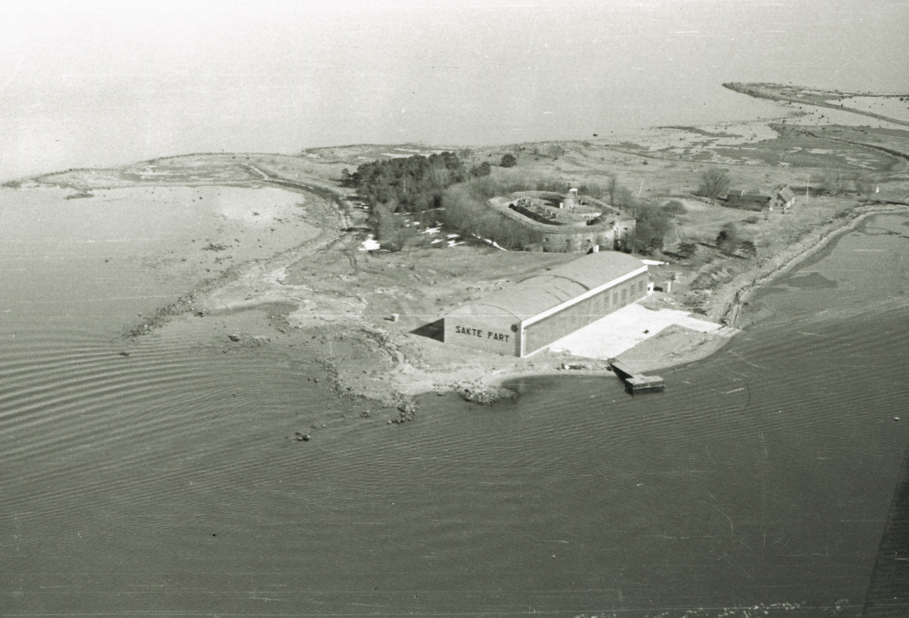 Vealøs april 1940. Den nye monteringshallen for sjøfly fra 1939 og Norske Løve, før påbygningene under krigen.